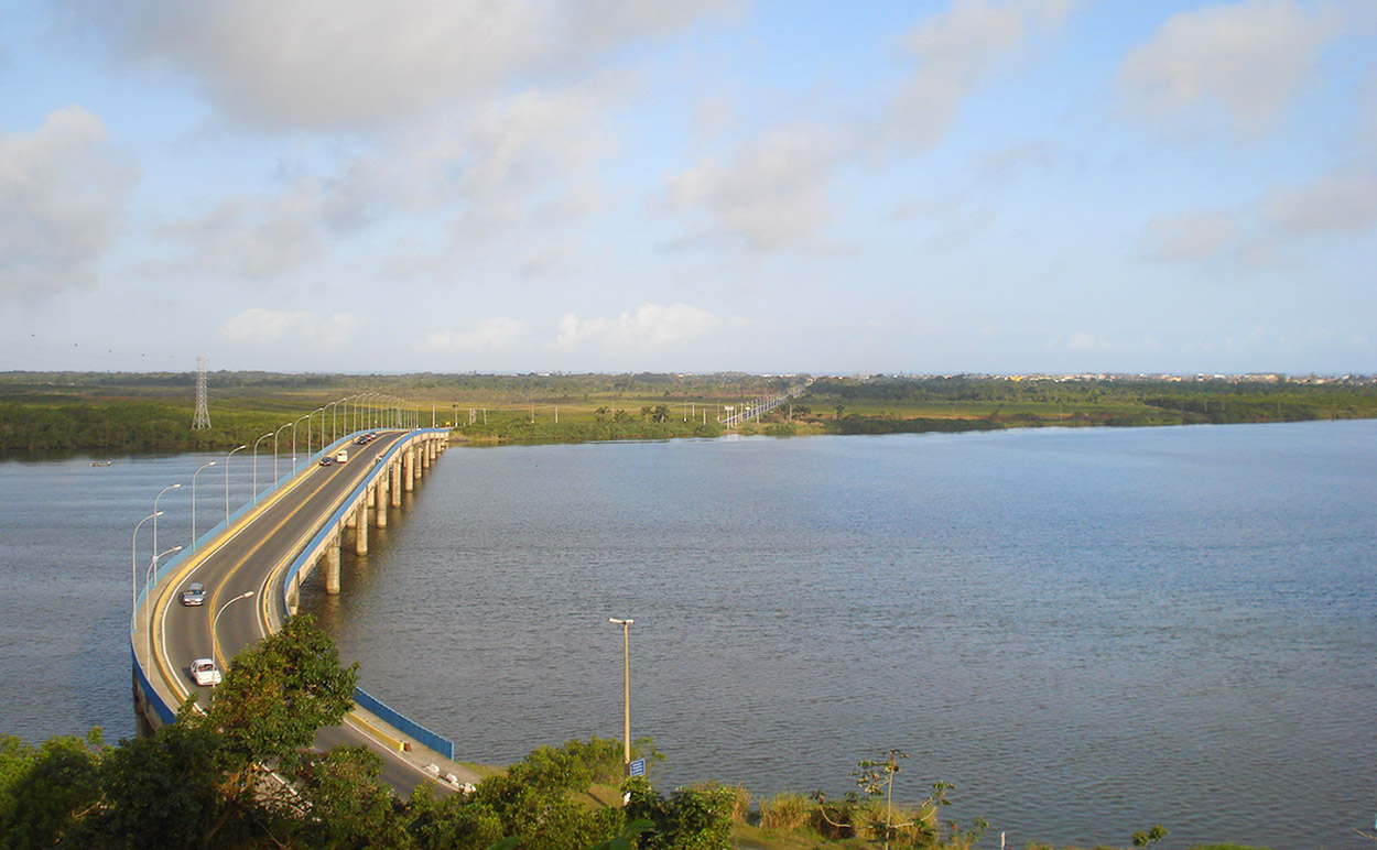 Ponte Laércio Ribeiro Iniciada em 1984, pelo então prefeito Láercio Ribeiro, só foi inaugurada no ano 2000, depois de 16 longos anos e de muitas batalhas jurídicas, somando-se assim a infra-estrutura implantada na Ilha Comprida a partir de sua emancipação político-administrativa, em 1992.